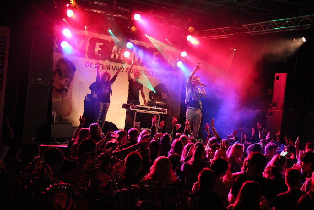 Yes-R tijdens een optreden in 2012